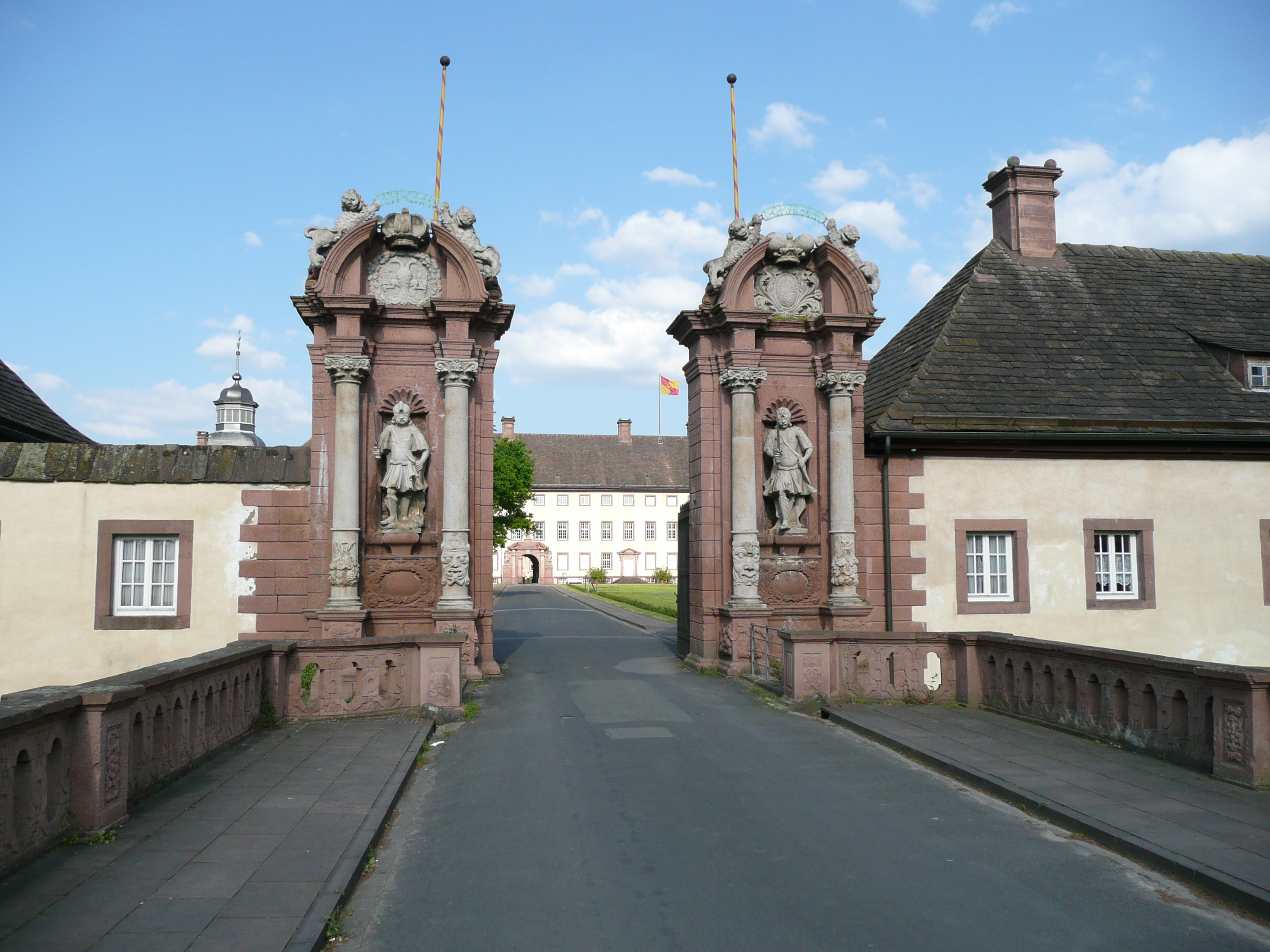 Tor der Klosteranlage Corvey bei Höxter